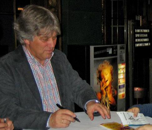 Rolf Zuckowski nach einem Konzert in Baden-Baden